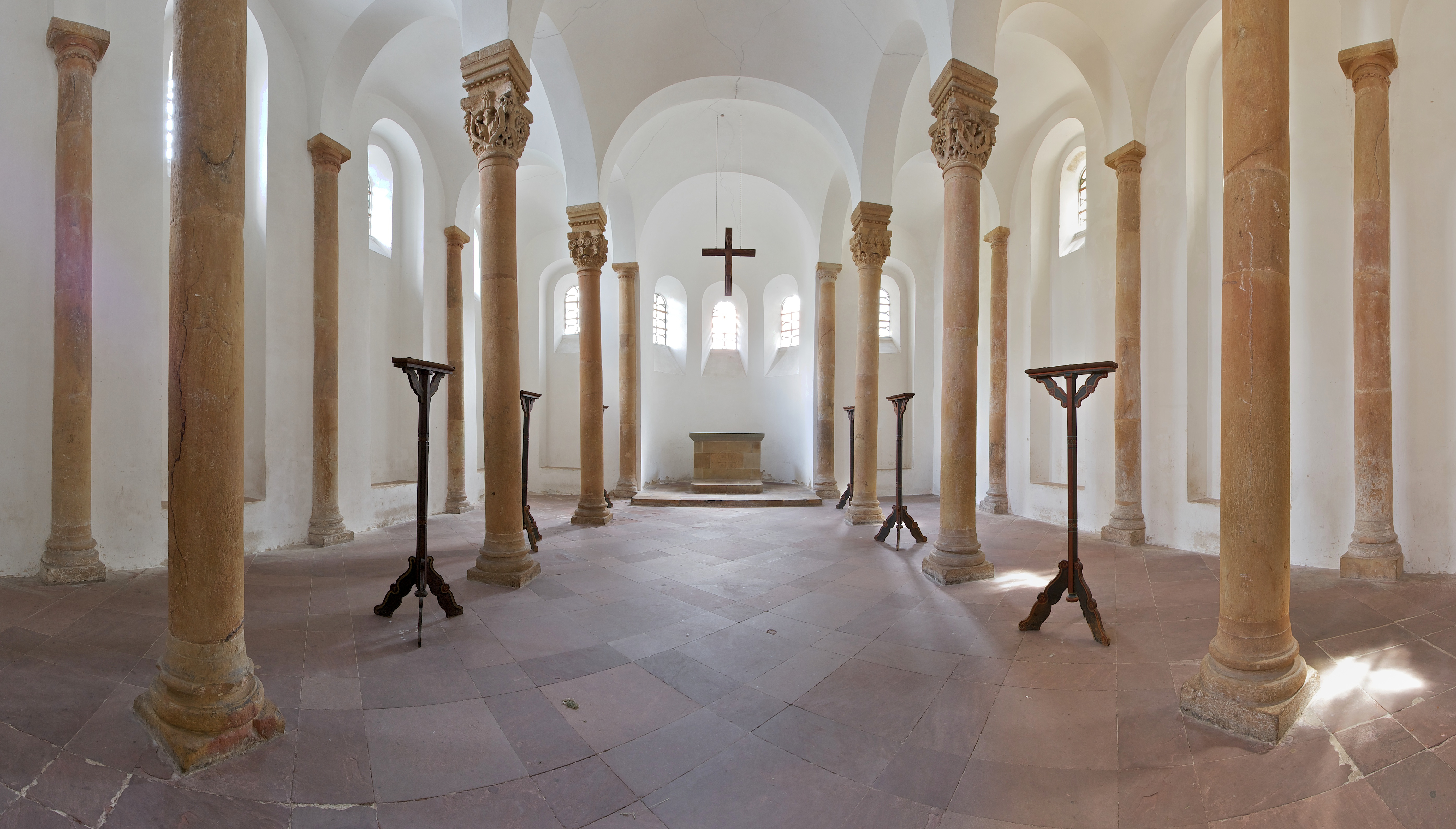 Innenansicht der Bartholomäuskapelle in Paderborn